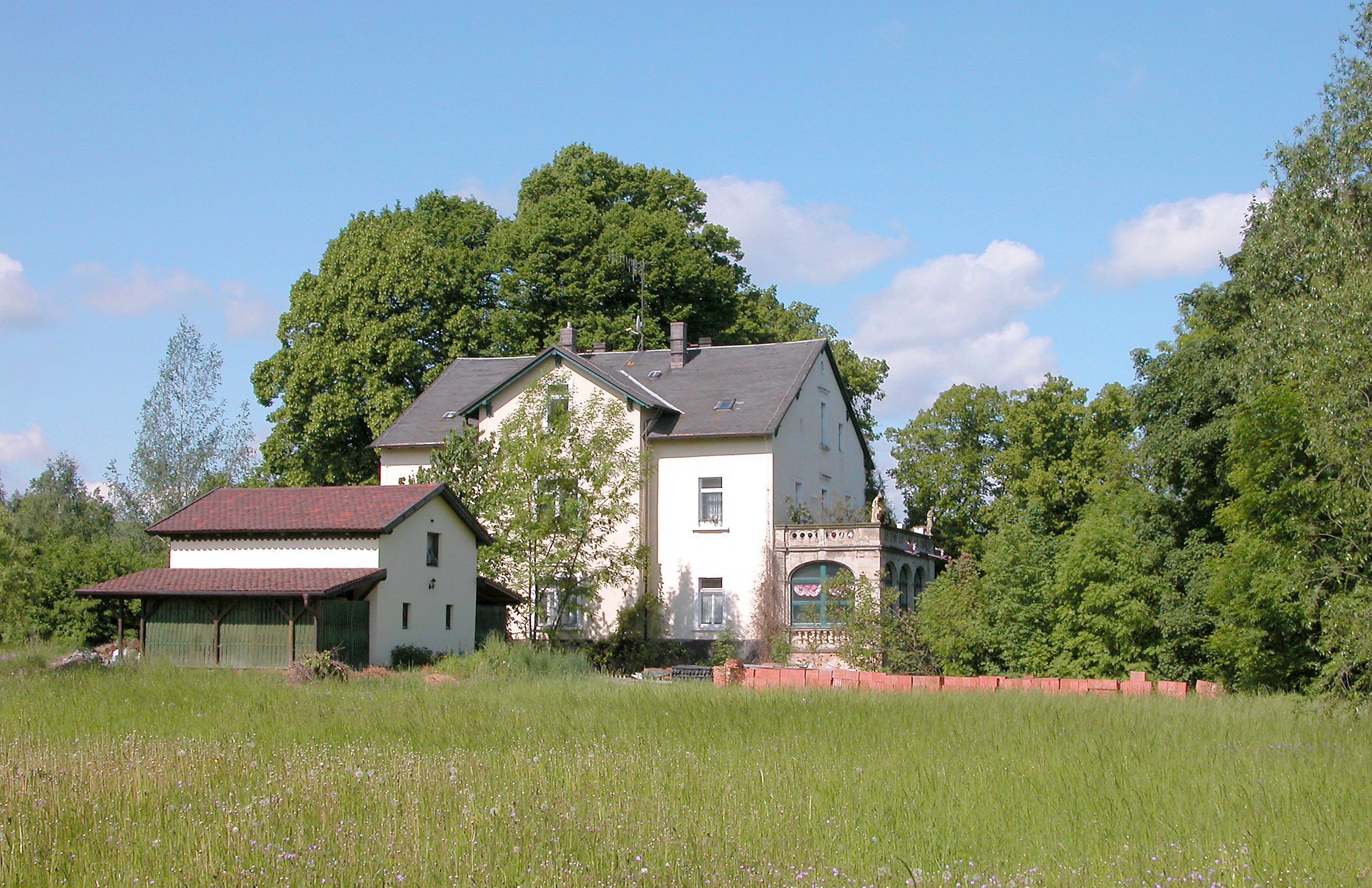 24.05.2006 09629 Steinbach (Reinsberg): Herrenhaus des ehm. Rittergutes, Dorfstr. 17. Saniert und bewohnt. [DSCN10193.TIF(20060524035DR.JPG(c)Blobelt